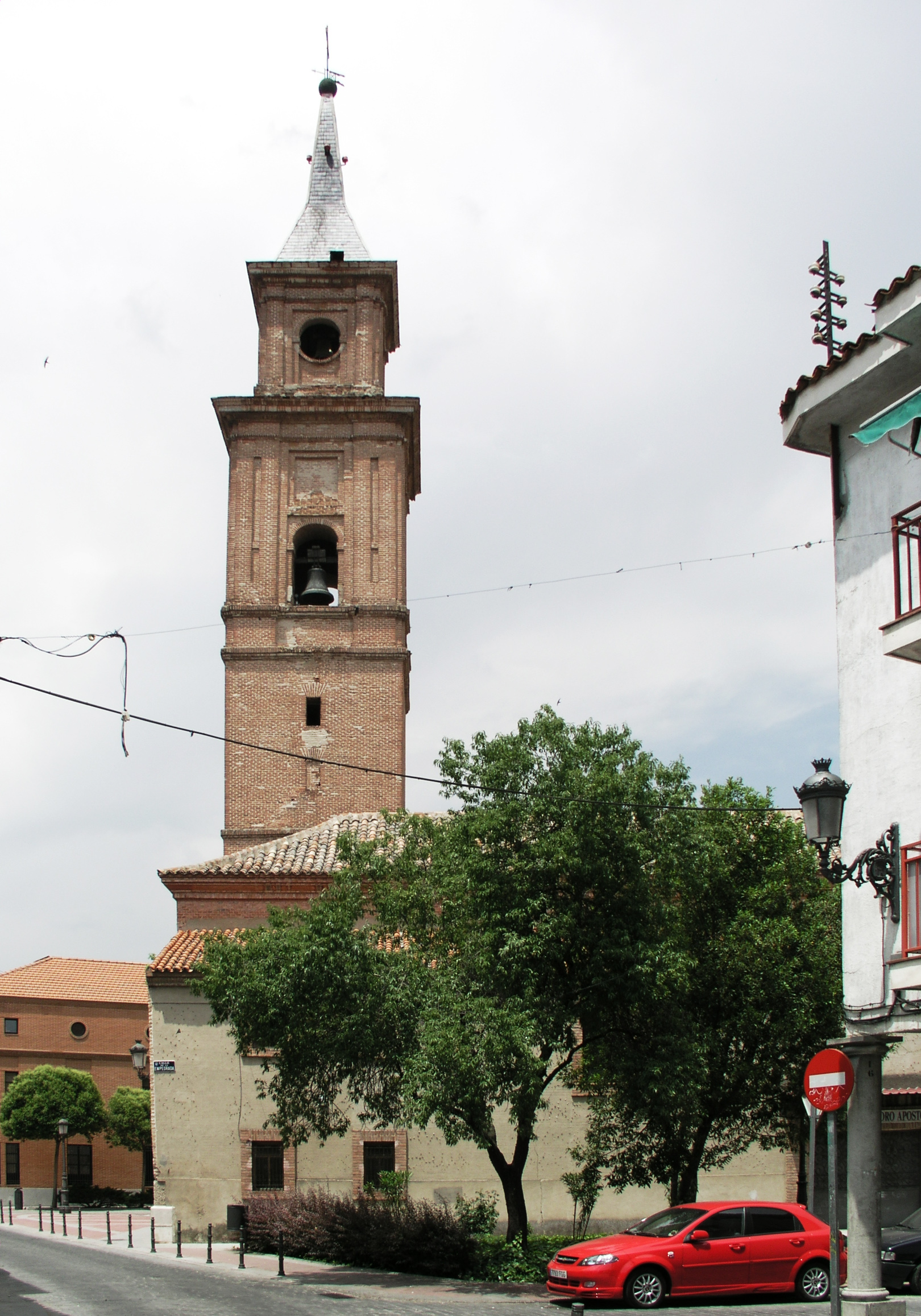 Barajas (pueblo), Madrid, Spain. Ayuntamiento.